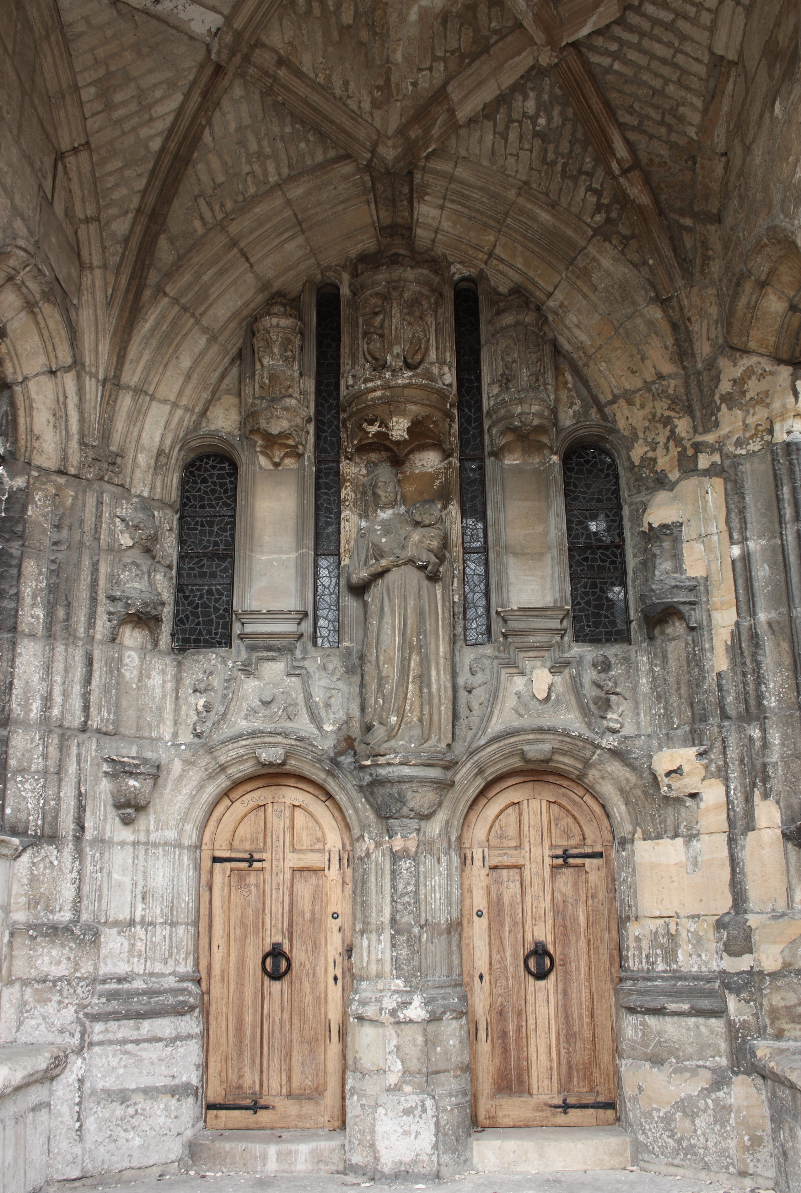 Katholische Kirche Notre-Dame de l'Assomption in Champagne-sur-Oise (Département Val-d’Oise) in der Region Île-de-France (Frankreich), Vorhalle des Südportals